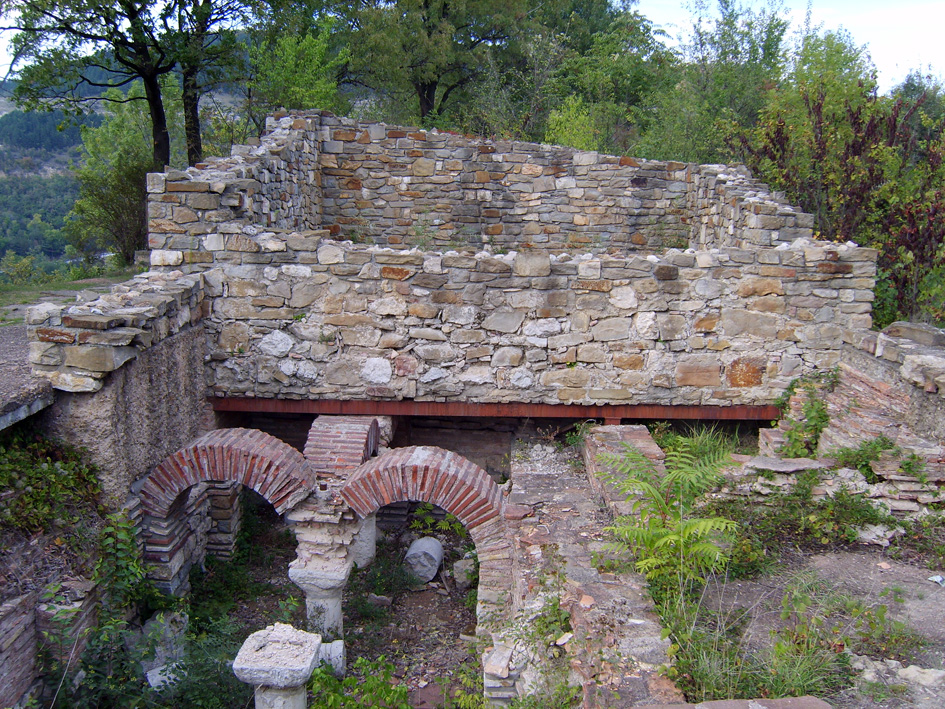 Болярско жилище, Царевец, 14 век